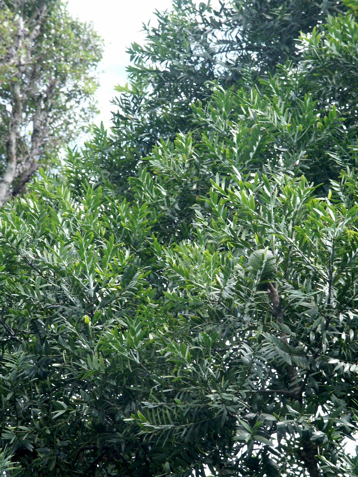 Feuillage et cône d'Agathis lanceolata - Proximité du col d'Amieu - Nouvelle-Calédonie.